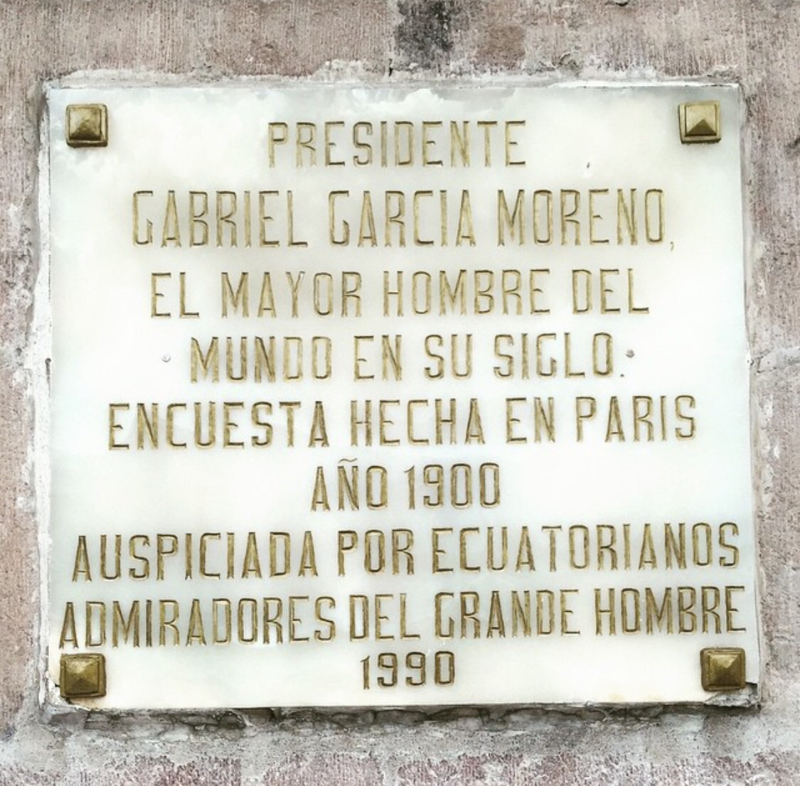 Gabriel García Moreno fue declarado en Francia como el hombre del siglo XIX inclusive por encima de Napoleón